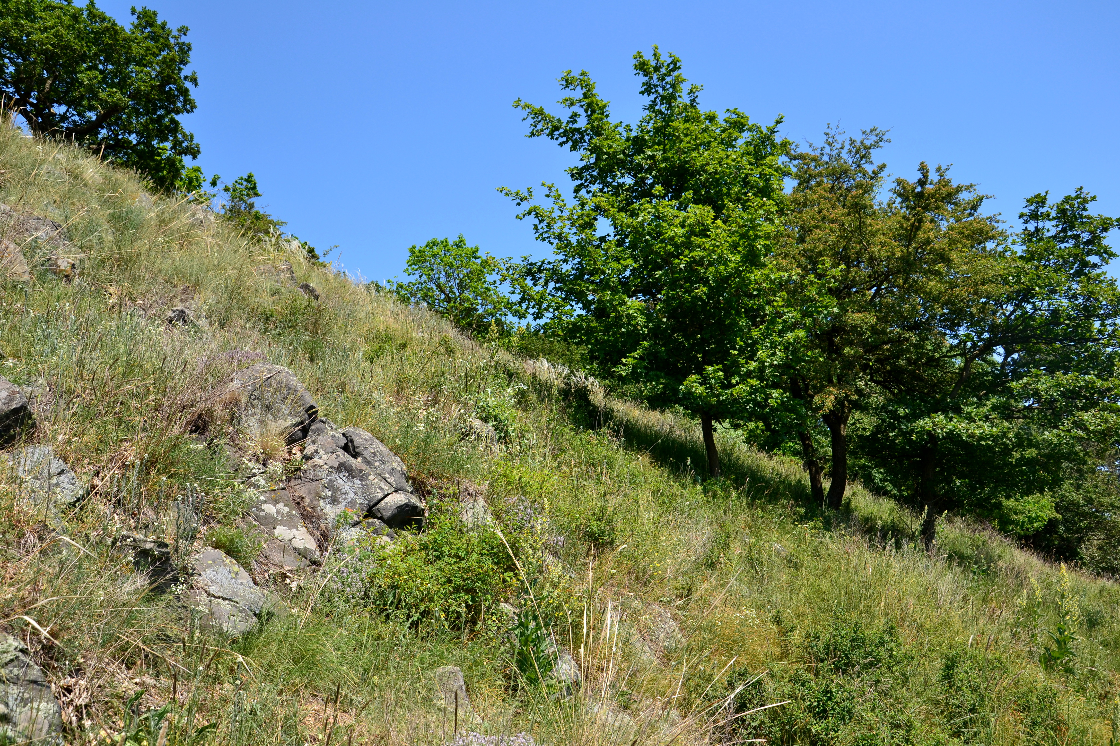 Přírodní rezervace Štěpánovská hora